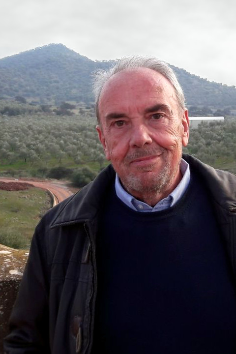 Escritor español: Manuel_L._Alonso